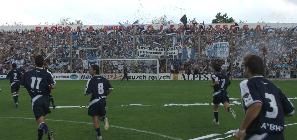 BH Vs Atletico Rafaela